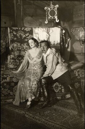 Bónyi Adorján: Szélcsend. Nemzeti Színház. Bemutató: 1933-11-03. Rendező: Horváth Árpád. Anita: T. Mátray Erzsi, Kapitány: Petheő Attila.